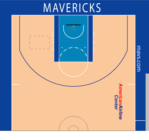 マヴスホームコート配色